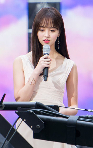 160604 드림콘서트